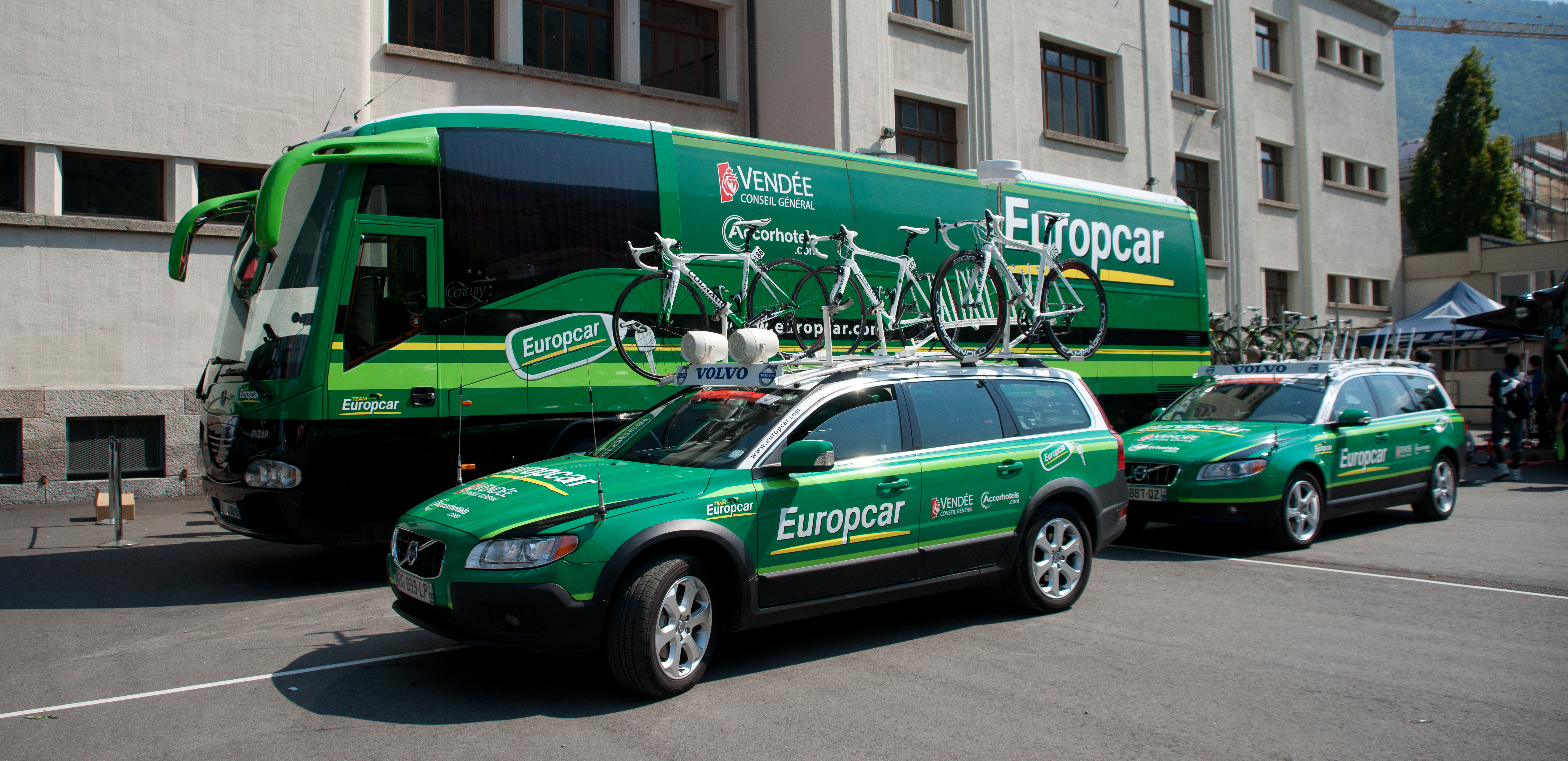 Contre la montre - Romandie 2010